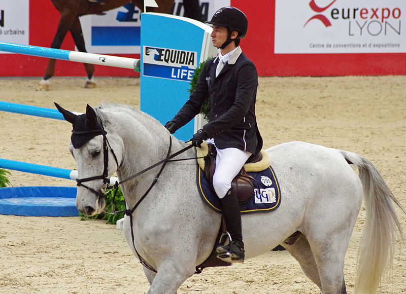 Steve Guerdat et Chips dans le Prix French Tour EADS lors du CSIW-5* d'Equita'Lyon.